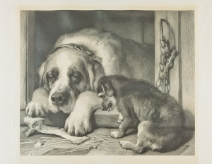 Doubtful Crumbs. Nach Sir Edwin Henry Landseer (British, London 1802–1873 London). Mezzotinto. Siehe auch